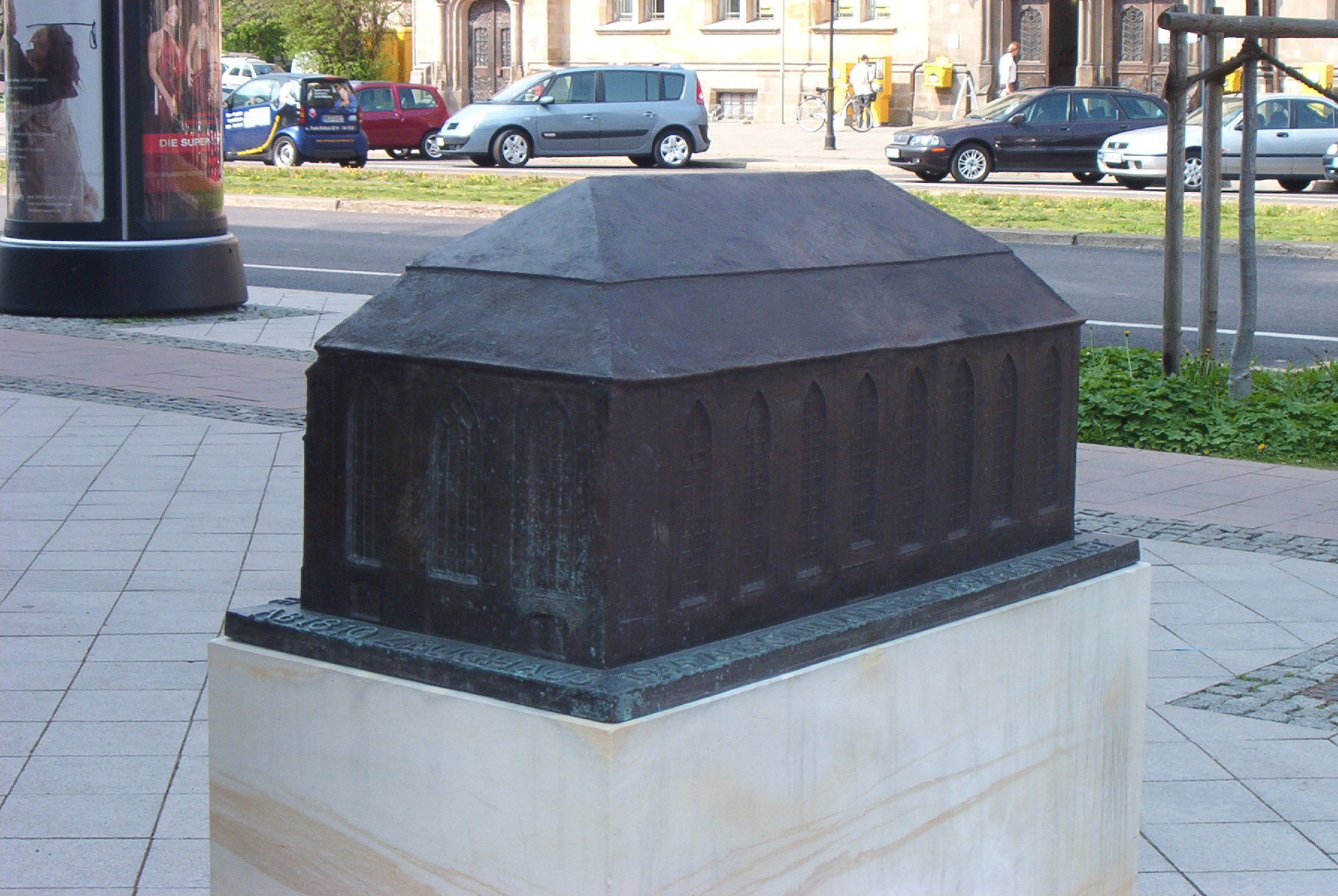 Modell der Sankt-Nikolai-Kirche Magdeburg, Breiter Weg Magdeburg